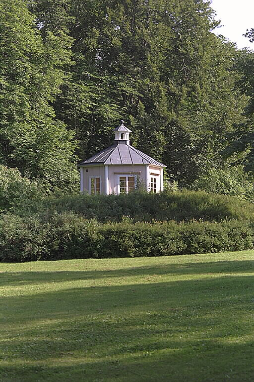 Lusthus. Motiv: Engelsbergs bruk Nyckelord: Byggnadsminnen, Industriminnen, Riksintressen, Världsarv Kategori: Bruksmiljö Lusthus.